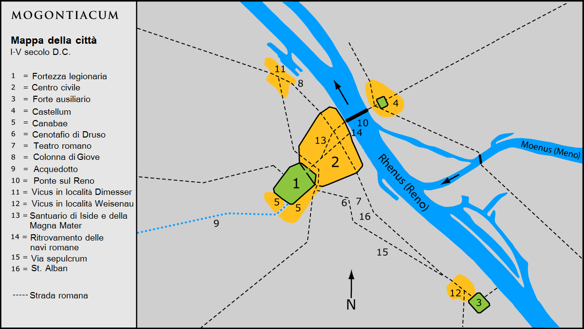 Versione italiana di File:Mogontiacum Plan.png